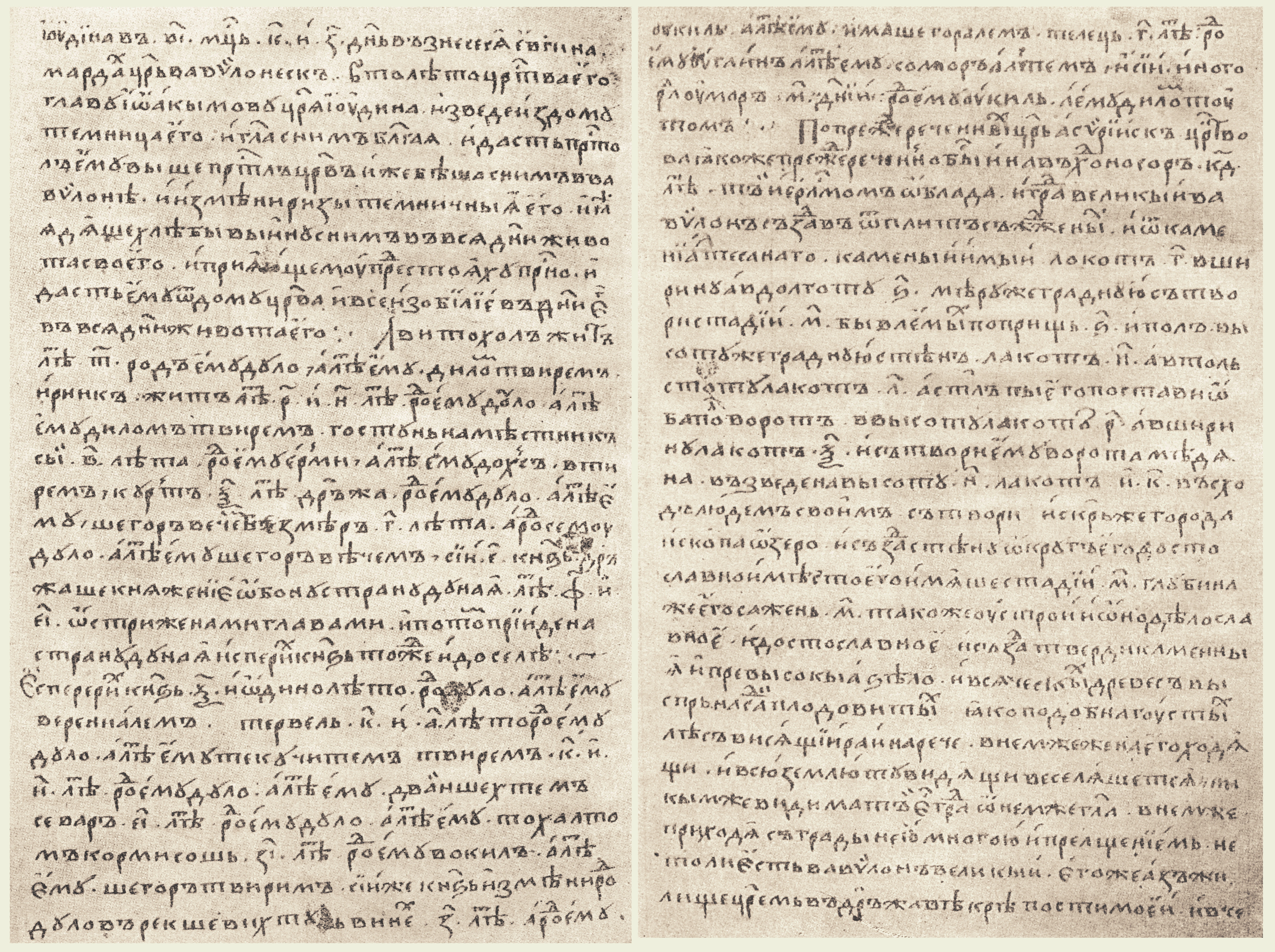 Текст — факсимиле на Именника от ръкописа на Петроградската публична библиотека, Погодиновская сбирка № 1437, лист 72а—73